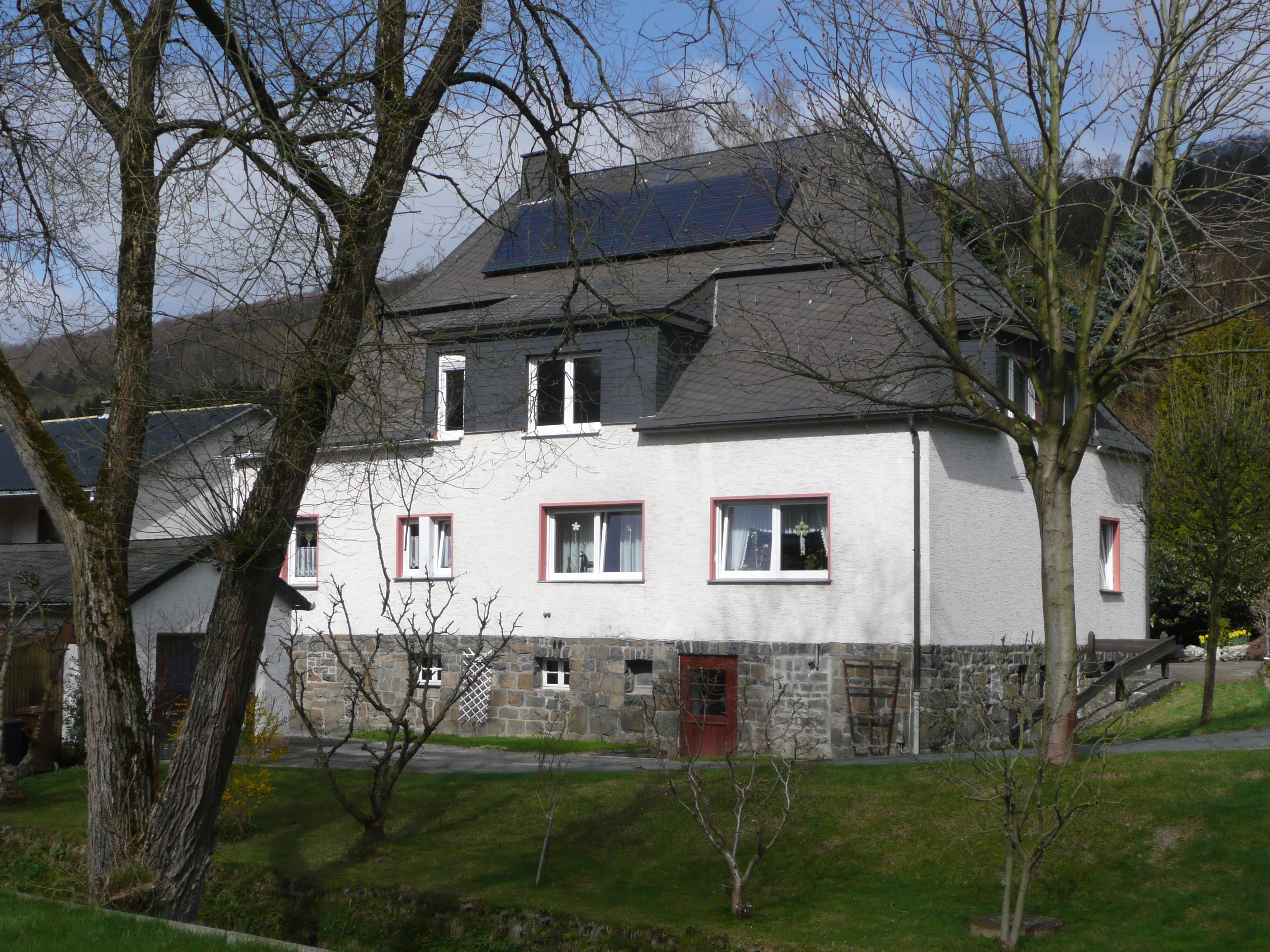 Schule Brabeck, heute Privat